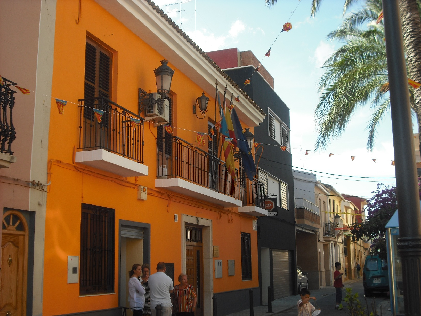 Ajuntament de Llocnou de la Corona.